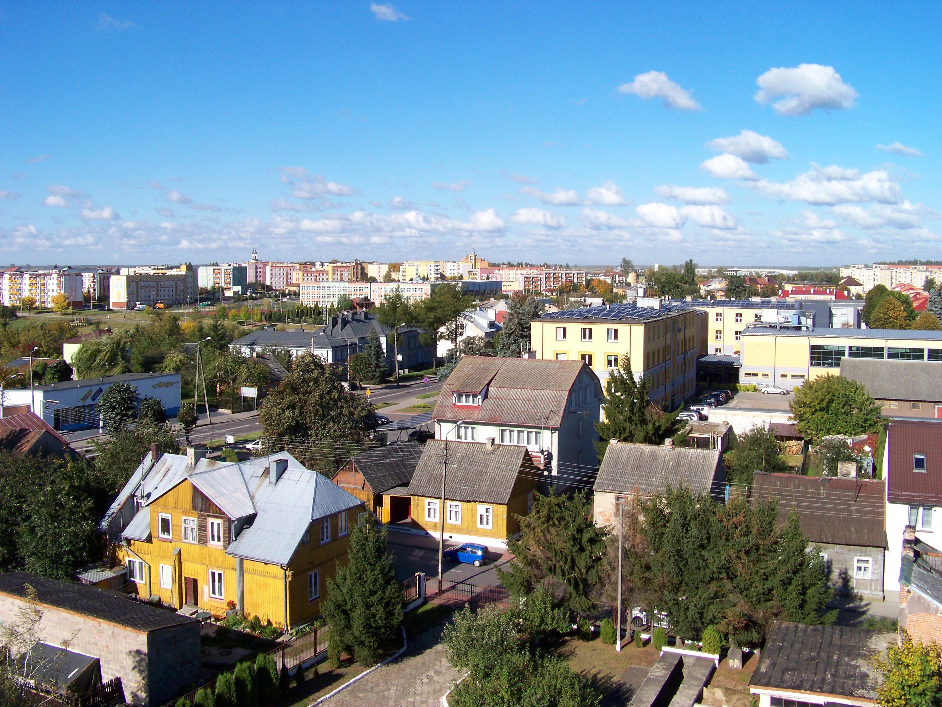 Kolno - widok z wieży strażackiej